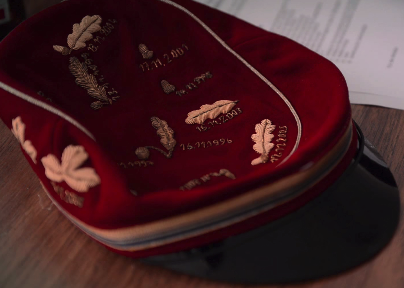 Mütze der AB Glanzenburger mit zahlreichen Landesvater Stickereien